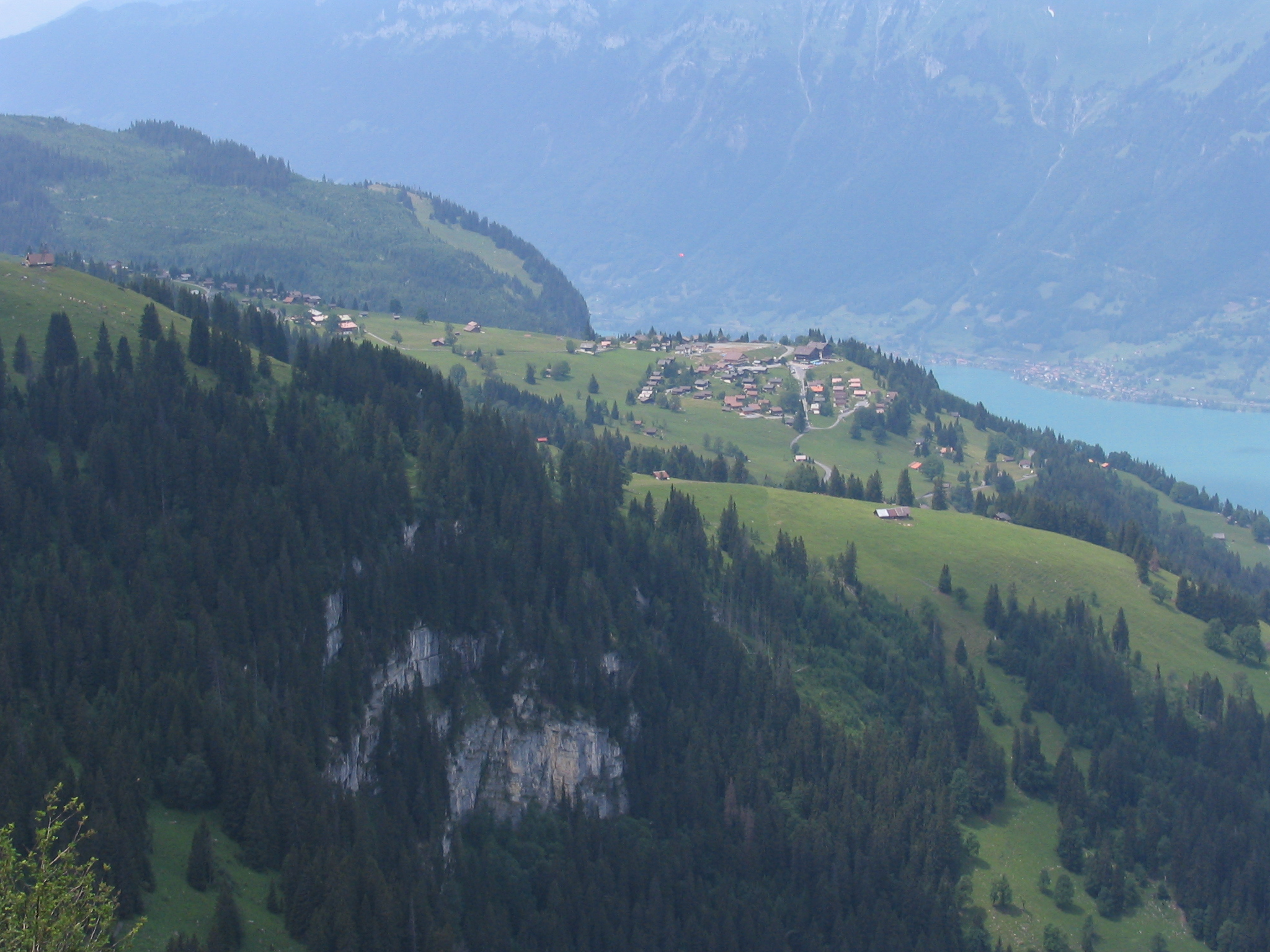 Axalp, Berner Oberland, Schweiz Keine Flugaufnahme, sondern vom Bergweg zwischen Oltschiburg (Berg) und Hinterburgseeli aus aufgenommen. Bild aufgenommen 2006.07.09 von Hadi